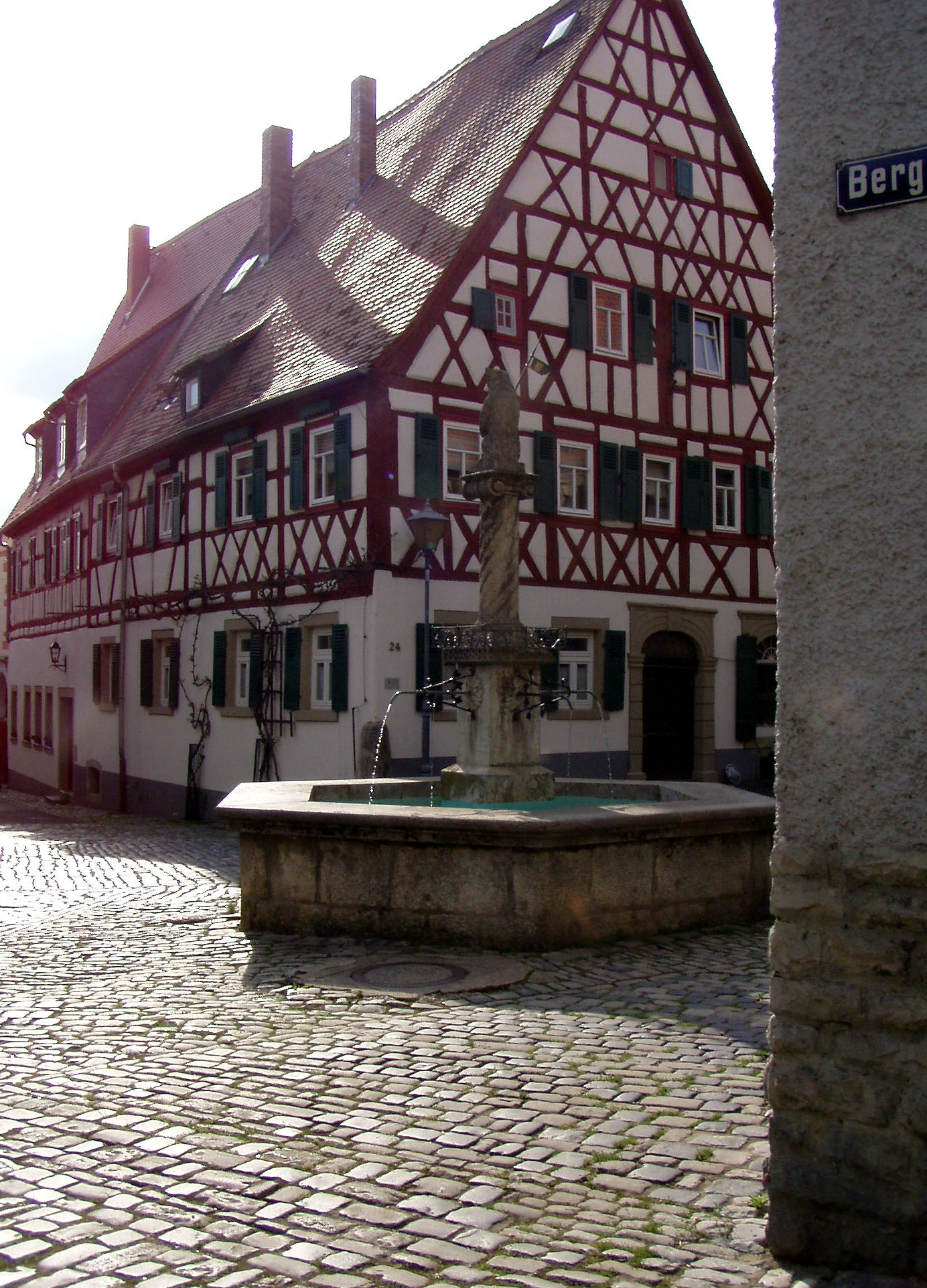 Marktplatz mit Brunnen in Mainbernheim